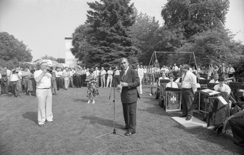 28.8.1990 Betriebsfest des Bundesministerium der Finanzen, Bundesminister der Finanzen Dr. Theodor Waigel erhält einen Bierorden.